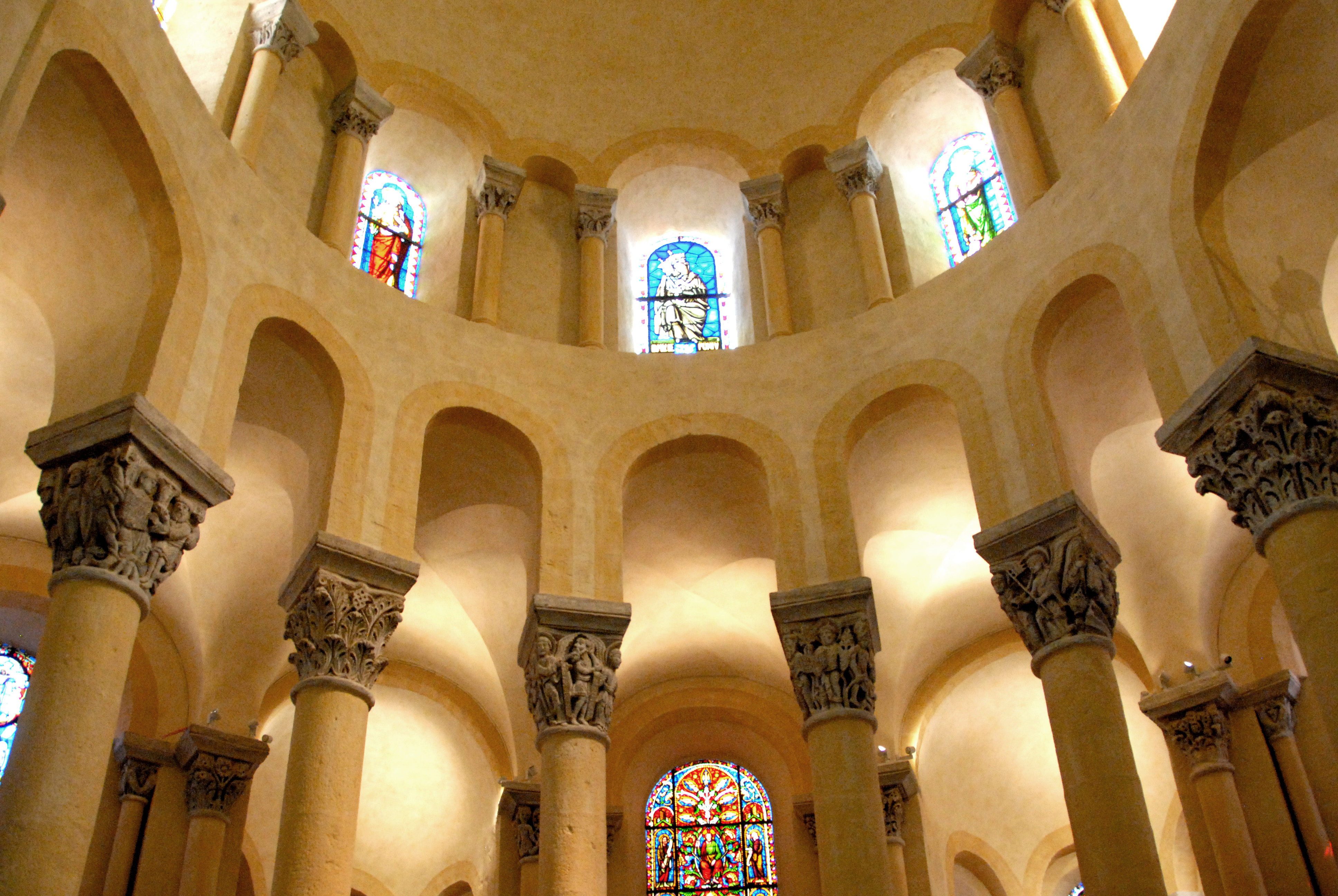 ChorapsisVierungskuppel